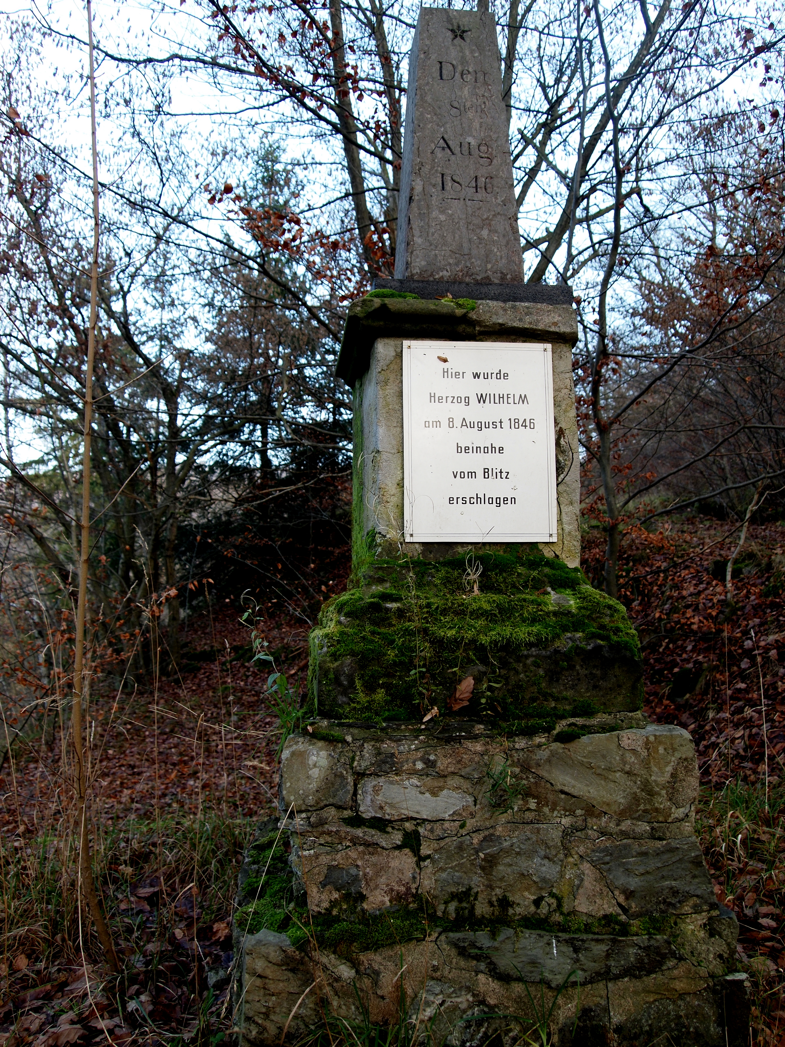 Altenbrak, Stadt Thale, Landkreis Harz, Sachsen-Anhalt; Denkmal an der sog. Alten Straße unweit Ortsein-/ausgang in Richtung B81